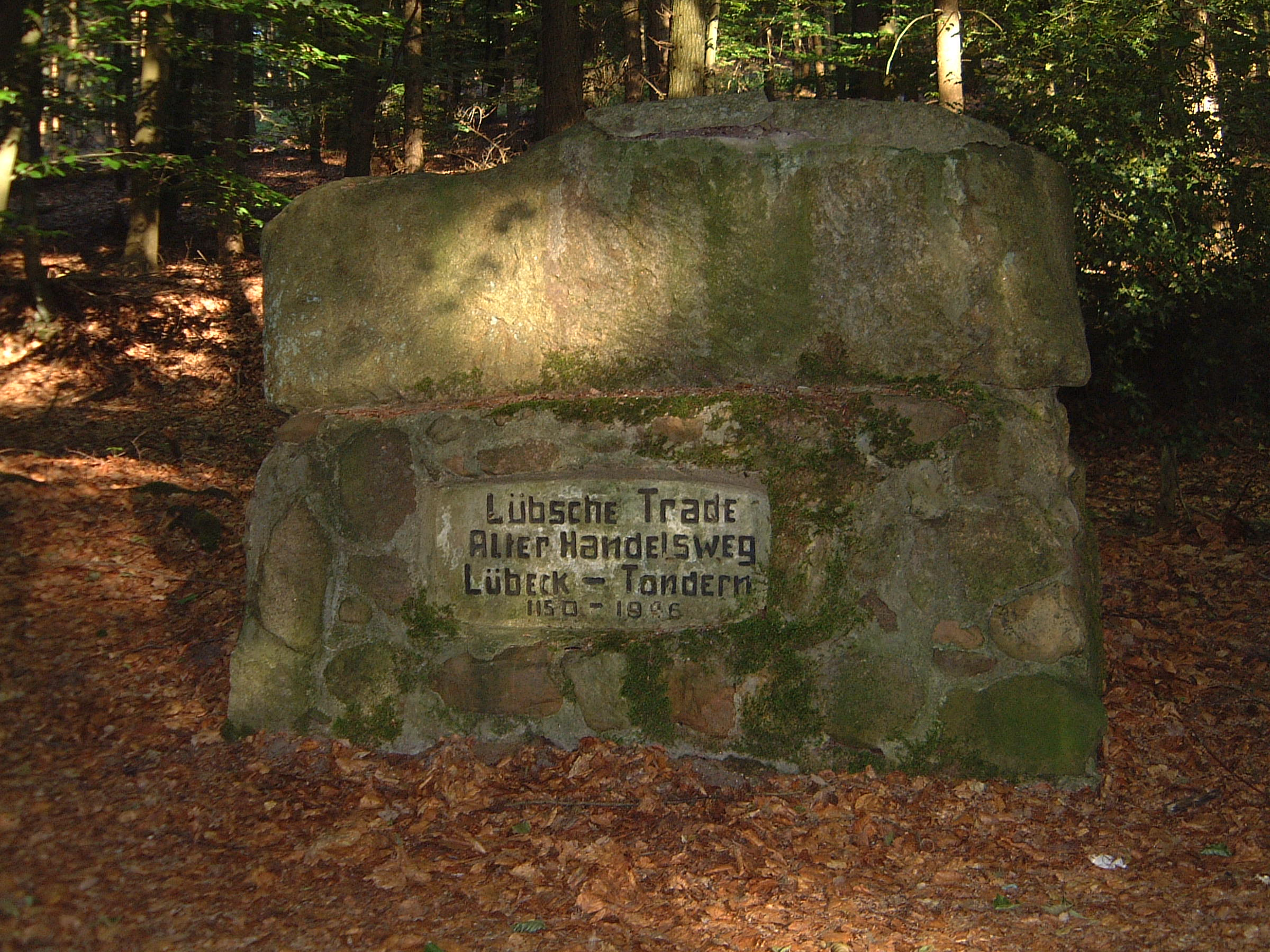 Lübsche Trade bei aukrug